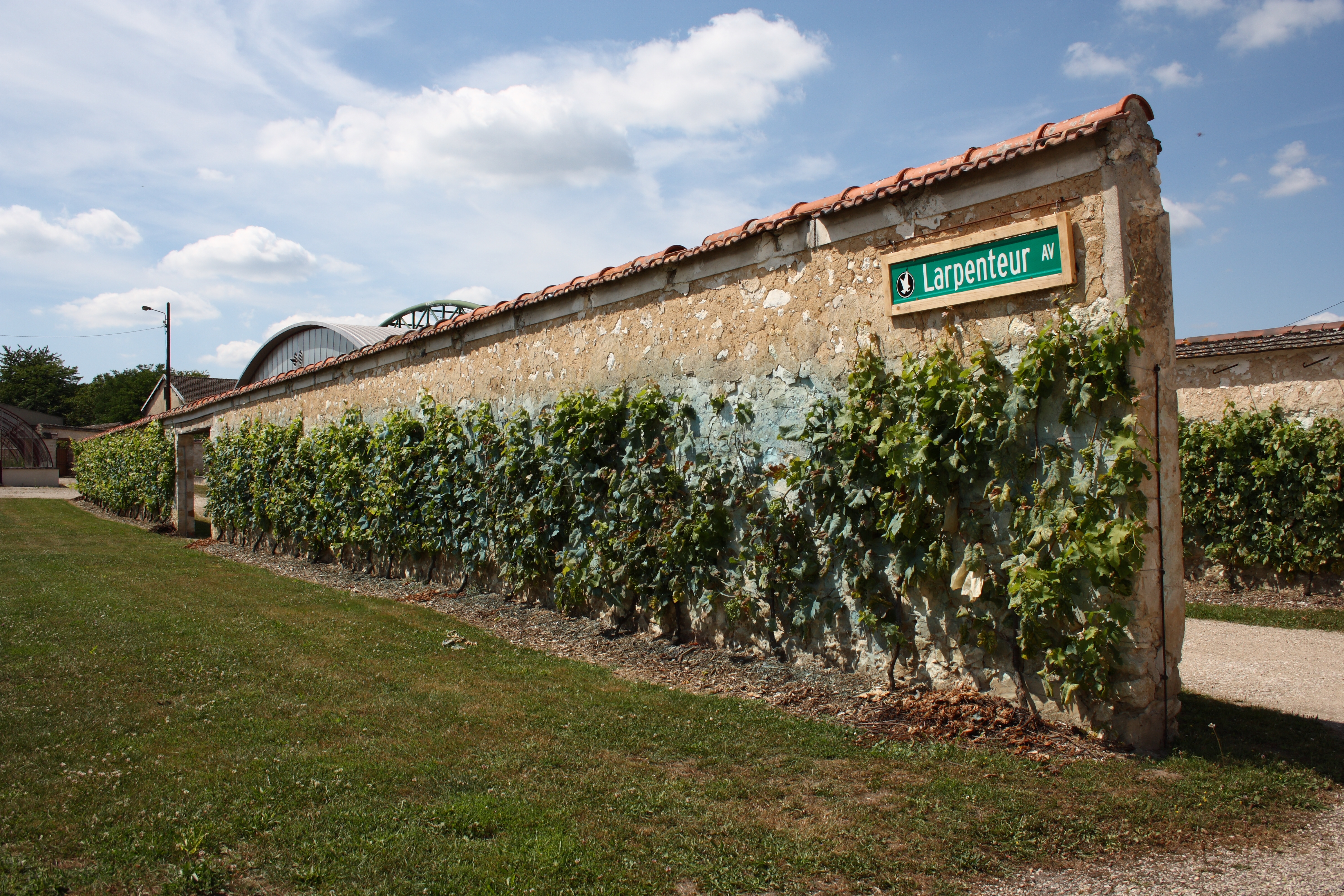 Traubenzucht in Thomery im Département Seine-et-Marne (Île-de-France)